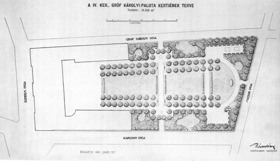 A Károlyi-kert terve. Räde Károly (Jessnitz bei Bautzen, Németo., 1864. márc. 11. – Bp., 1946. febr. 20.): kertész. 1893-ban a Földmívelésügyi Min. meghívására hazánkba jött ét az akkor létesült Kertészeti Tanintézet díszkertészeti részlegének megszervezésében vett részt. 1894 – 1914 között a Tanintézet vezető főkertésze, a dísznővénytermesztés, a virág-, zöldség- és gyümőlcshajtatás oktatója. 1913-ban a Fővárosi Kertészet ig.-ja lett. Ő tervezte a gödöllői Erzsébet királyné parkot és a debreceni Gazdasági Ak. parkját, a fővárosban a Kossuth Lajos tér mértani kertjét. Teljesen angol parkstílusú munkája volt a Gellérthegy kertészeti rendezése. 1930-ban vonult nyugalomba. Az Orsz. Magy. Kertészeti Egyesület alelnöke volt.